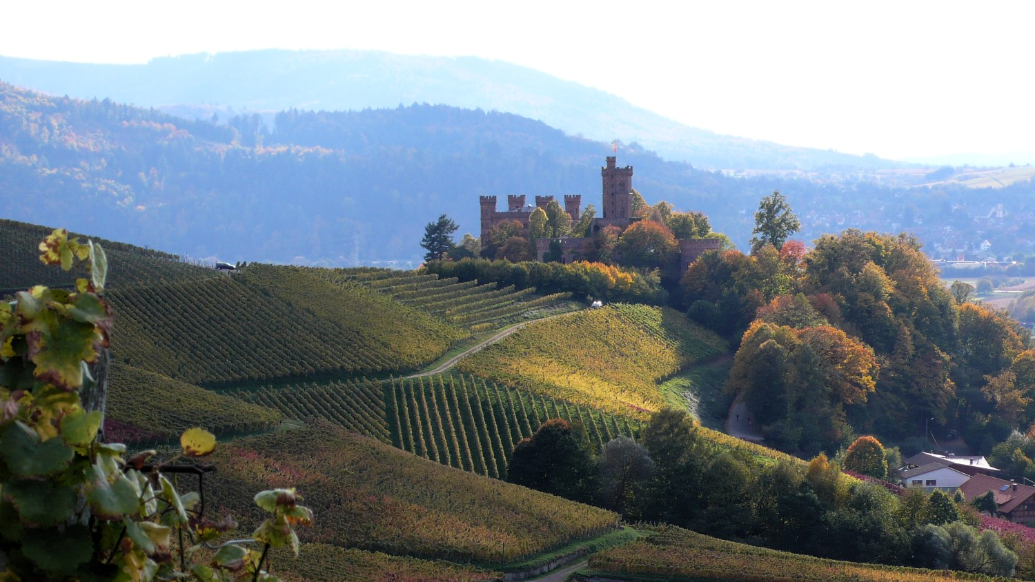 Weinanbau in der Ortenau